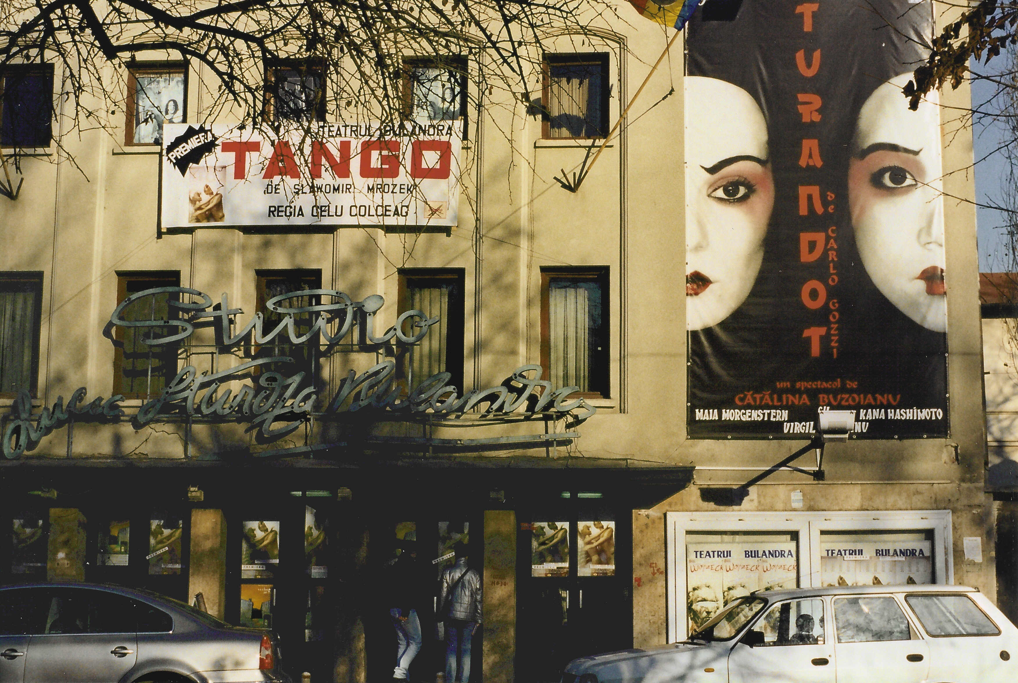 Bulandra studio theater (Teatrul Studio Bulandra), Bucharest, Romania